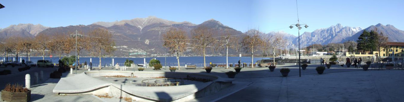 il lago dalla piazza di colico